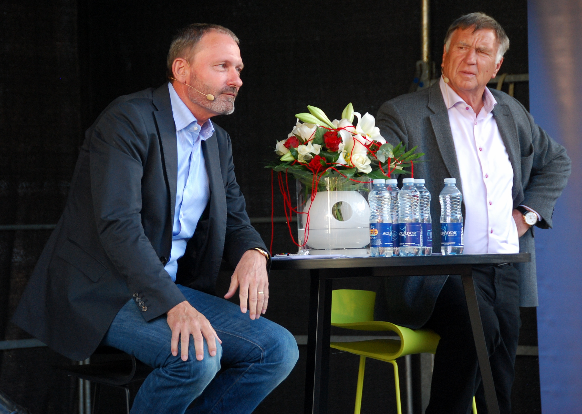 Den tidligere fodboldtræner Sepp Piontek og fodboldspiller Preben Elkjær. Her i forbindelse med et arrangement før U-21 Europamesterskabet i fodbold 2011 i Viborg.